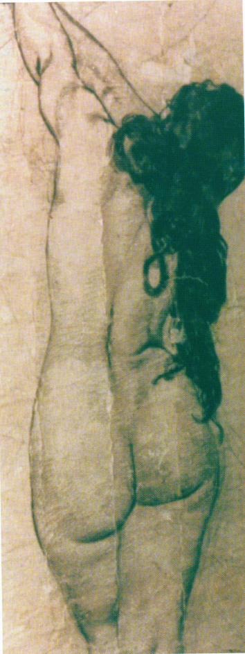 Dibujo de desnudo femenino